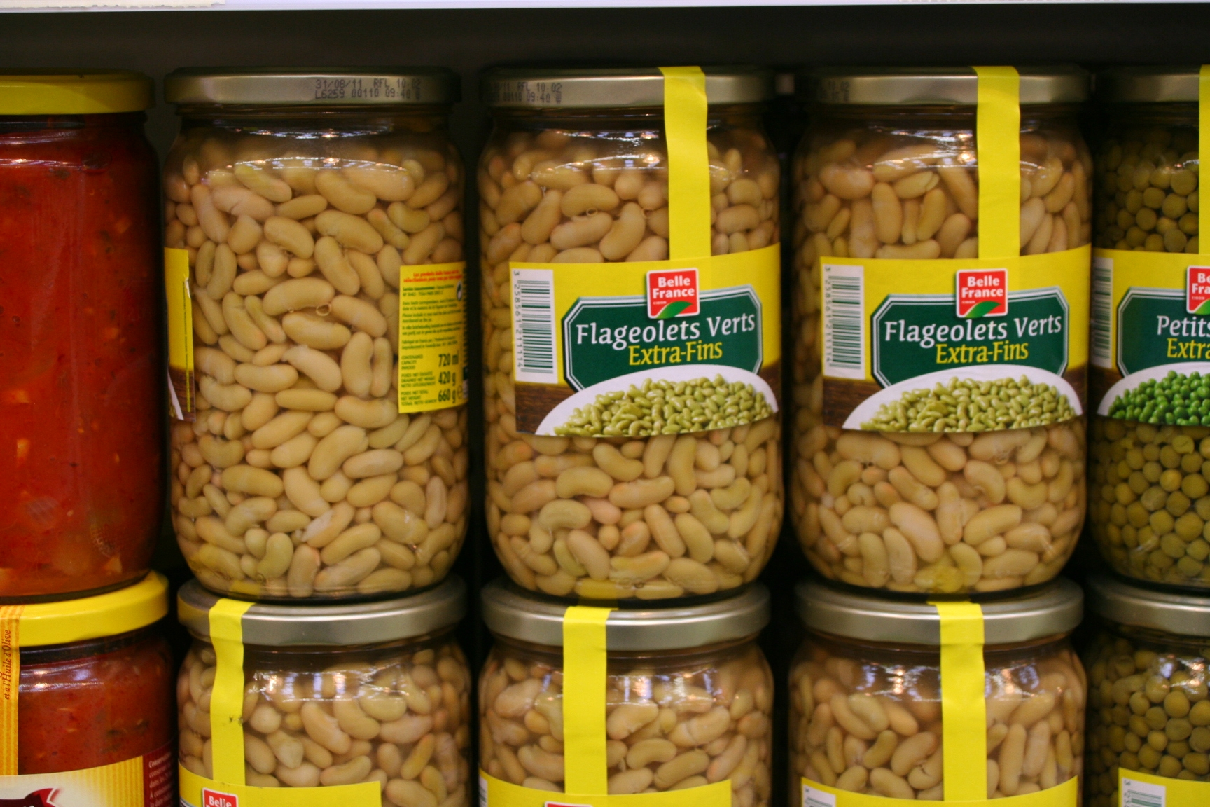 Flageolets verts en conserve dans des bocaux de verre (Phaseolus vulgaris)